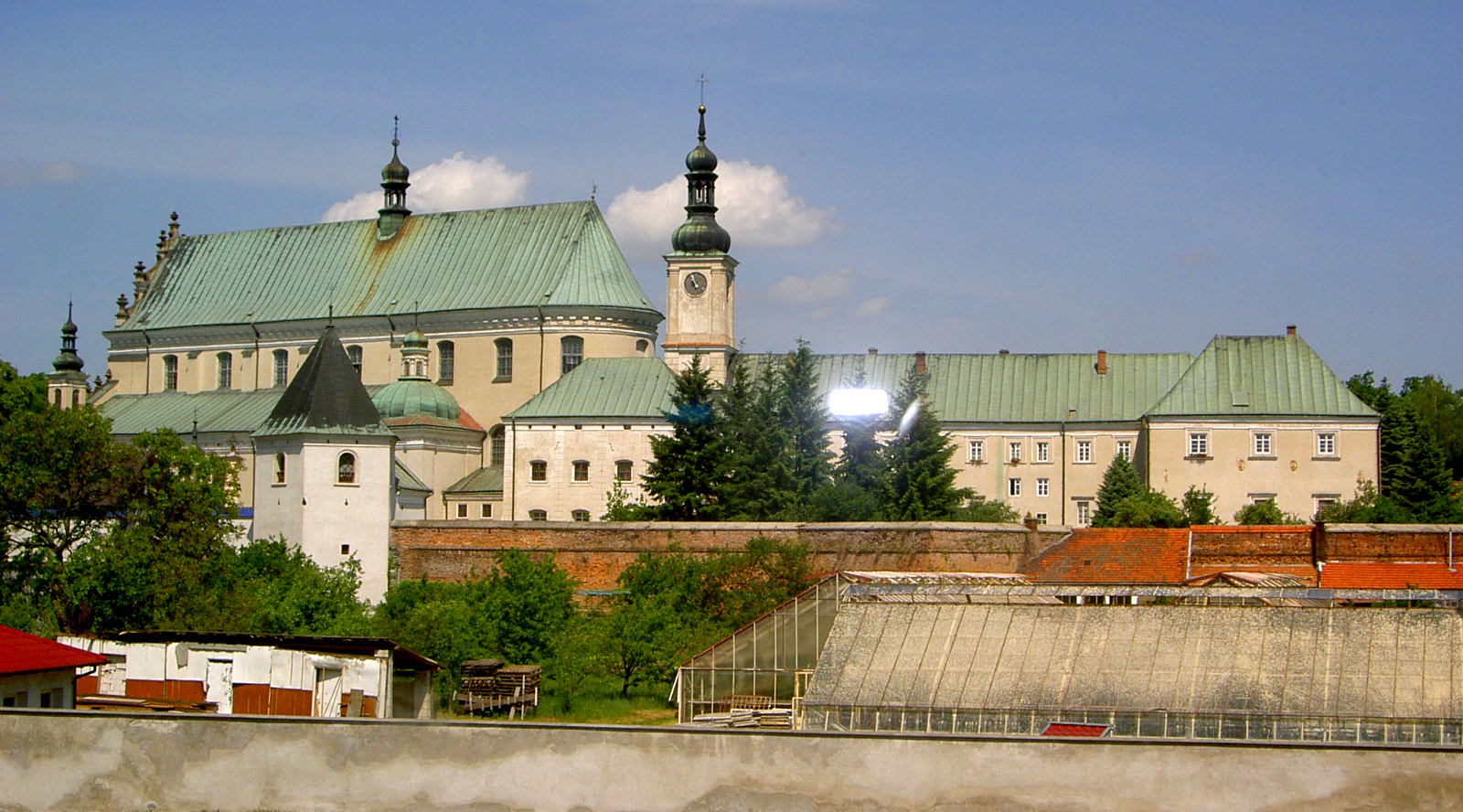 Leżajsk, Poland • Kościół i klasztor o.o. Bernardynów • Basilica and Bernardine Convent